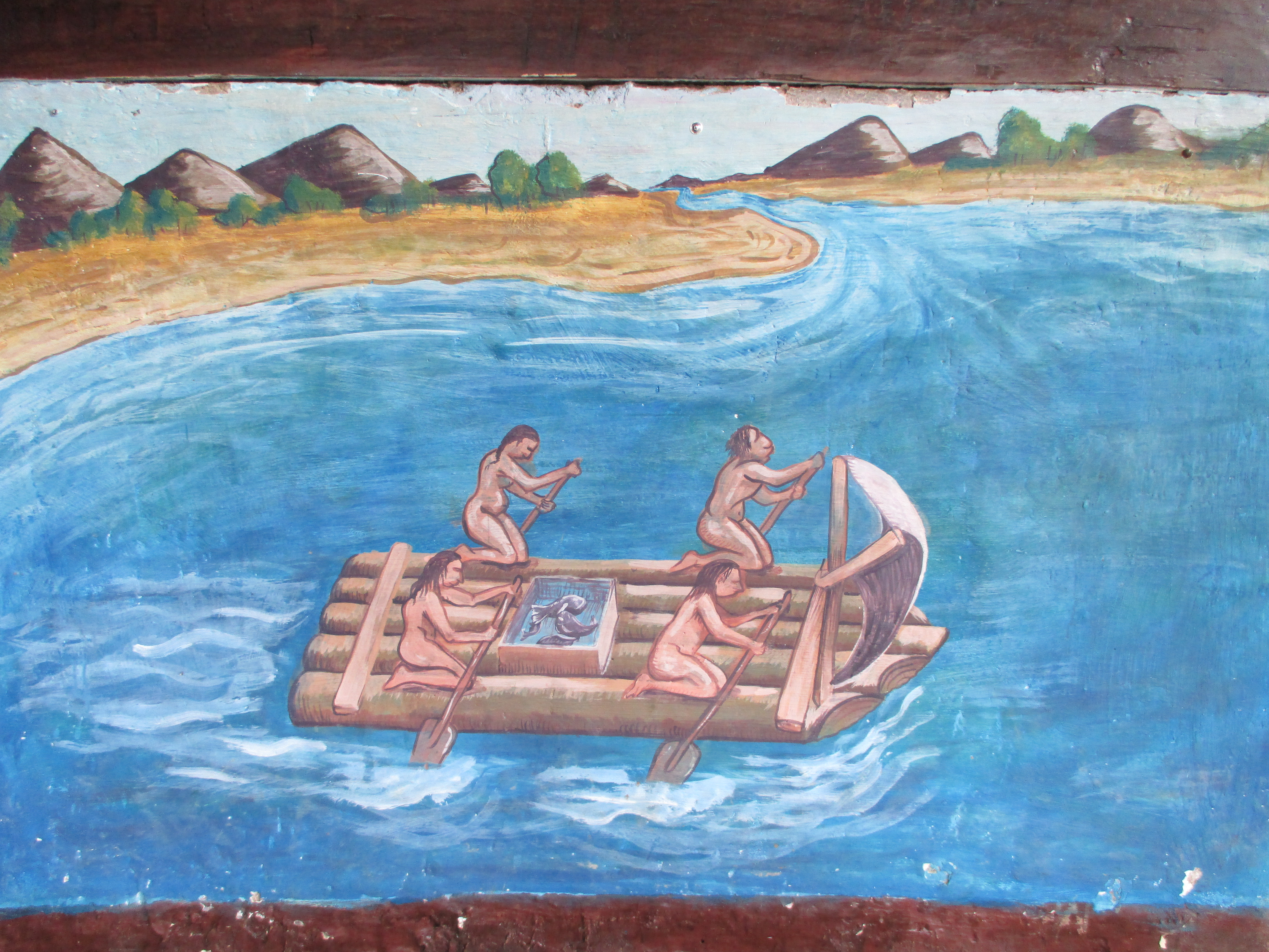 Grupos de nativos sudamericanos pescadores en alguna playa de la antigua Tenencia de Puerto Viejo, según un dibujo original aproximado a la descripciones del Cronista Girolano Benzoni, el cual se encuentra en el Centro Cultural de Agua Blanca, Puerto Lopez, Manabi, Ecuador. Compartido por el historiador Jodison Javier García Alcivar.